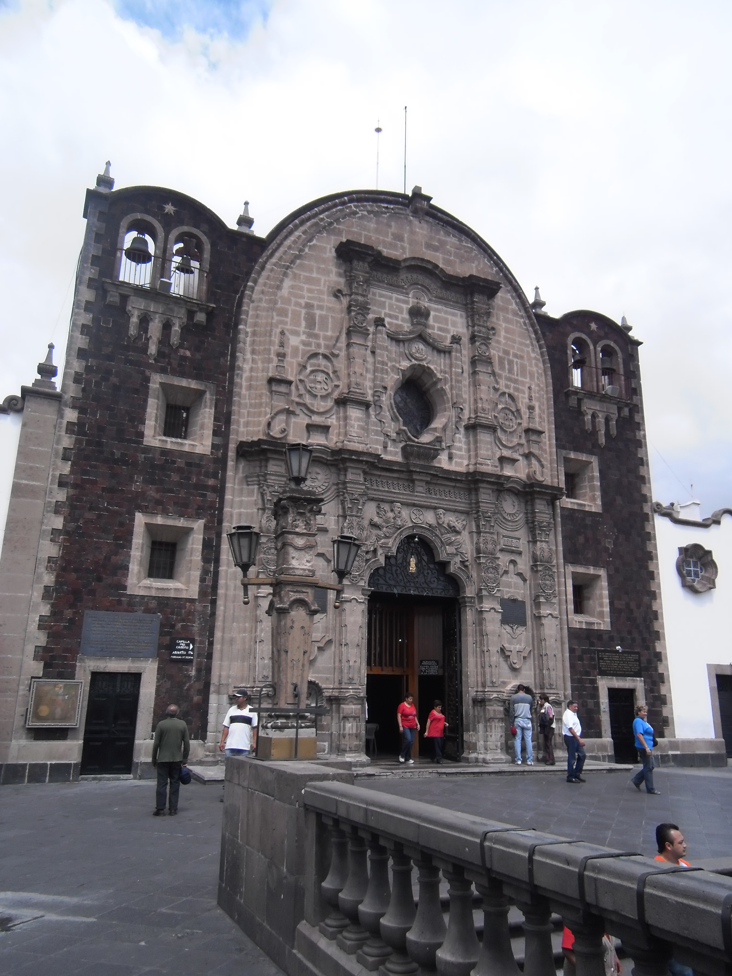 Capilla del Cerrito